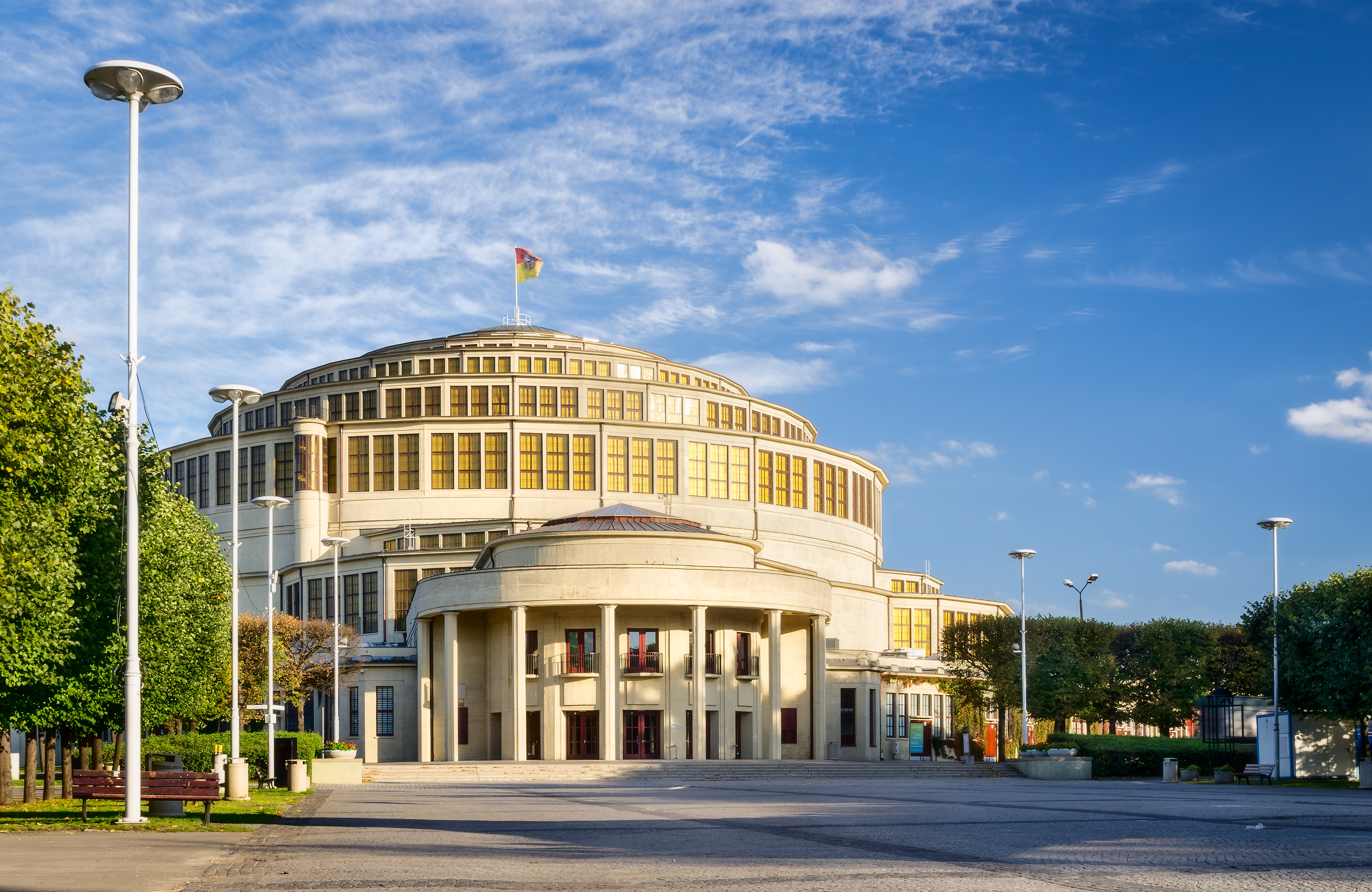 Wrocław, zespół Hali Ludowej